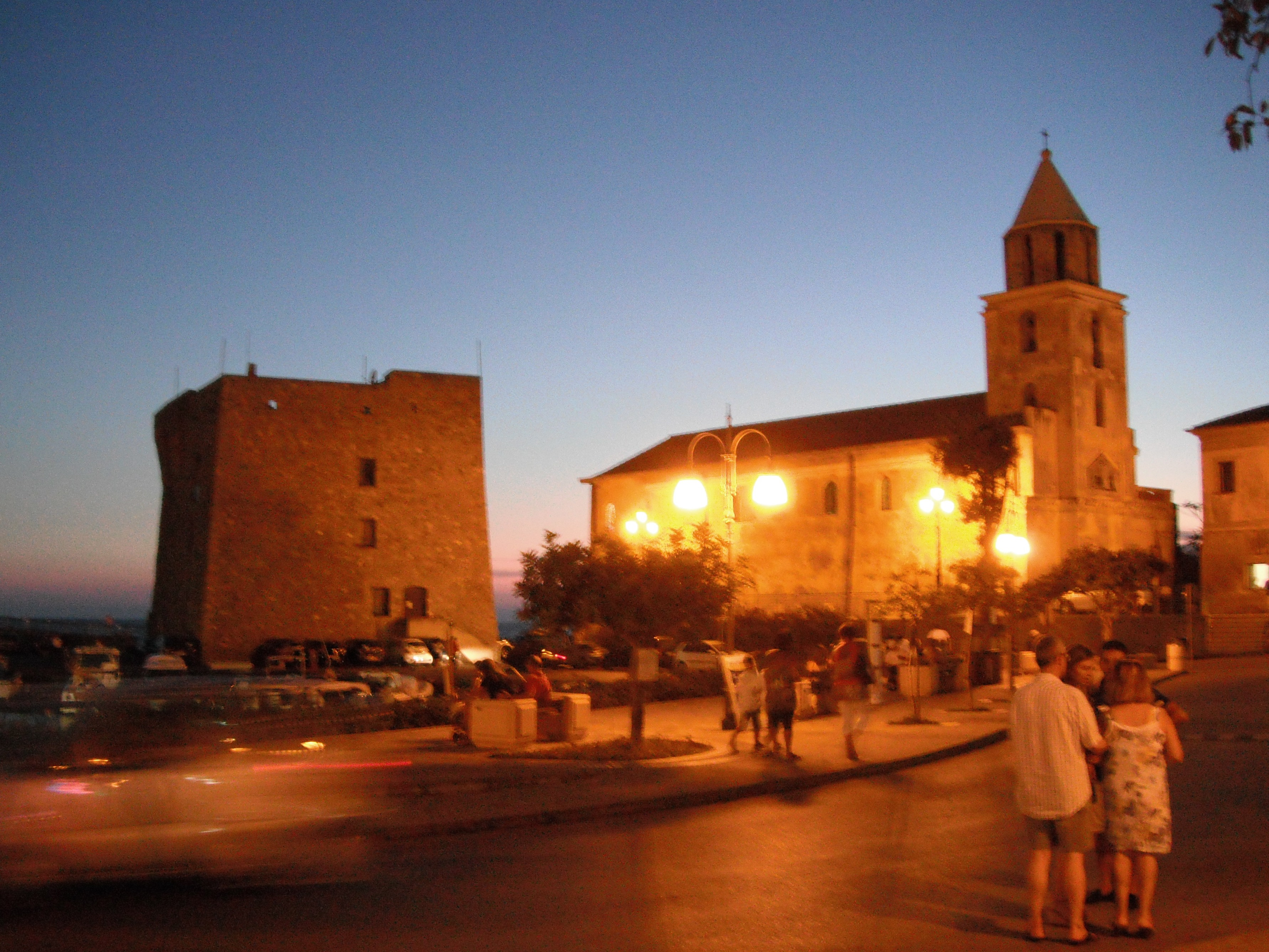 Torre di Acciaroli (SA)